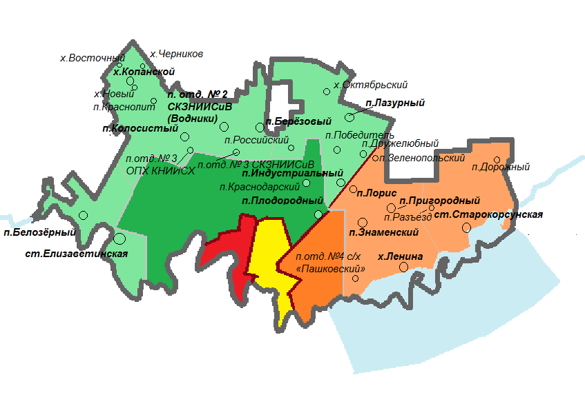 внутригородские округа Краснодара